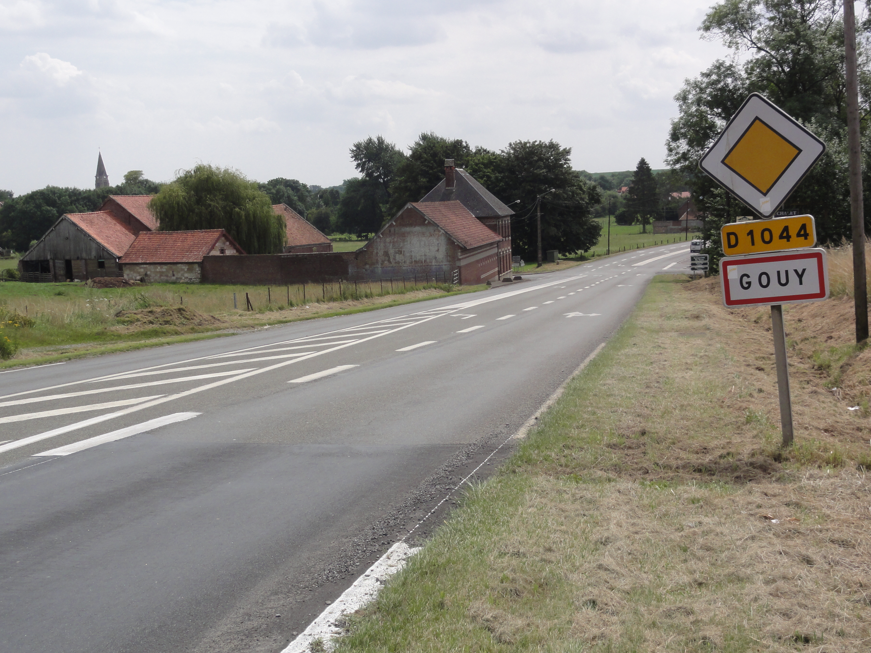 Gouy (Aisne) city limit sign